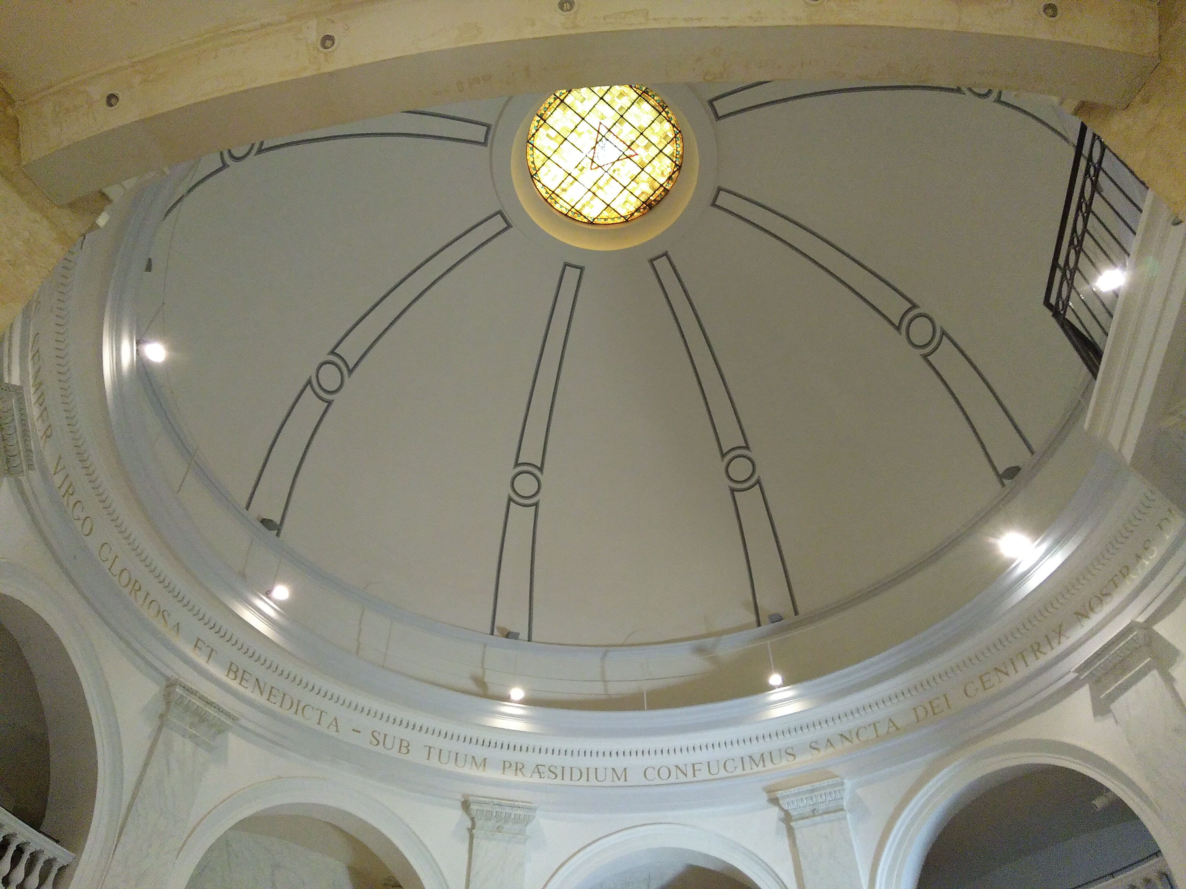 Vue intérieur de la coupole de l'église ND des Accoules (XIXe siècle)